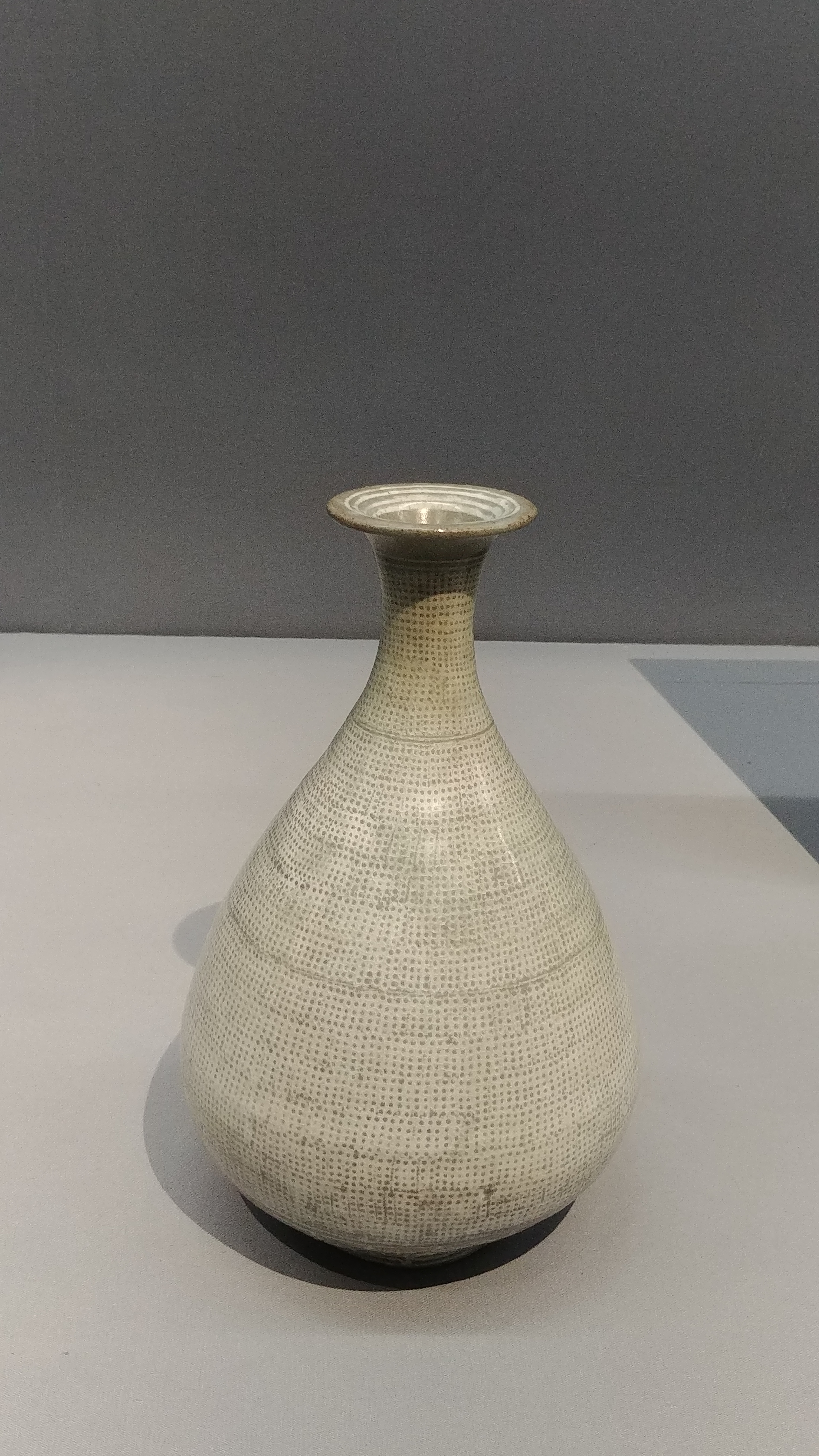 정성스럽게 가득 채워진 집단 연권문으로 보아 인화분청의 절정기에 만들어진 최상질의 수작임을 알수 있다. 병의 하단에 검정과 흰색으로 장식된 꽃무늬는 구성의 교미를 더한다. 이러한 인화분청은 주로 경기도 지역에서 제작되었다.